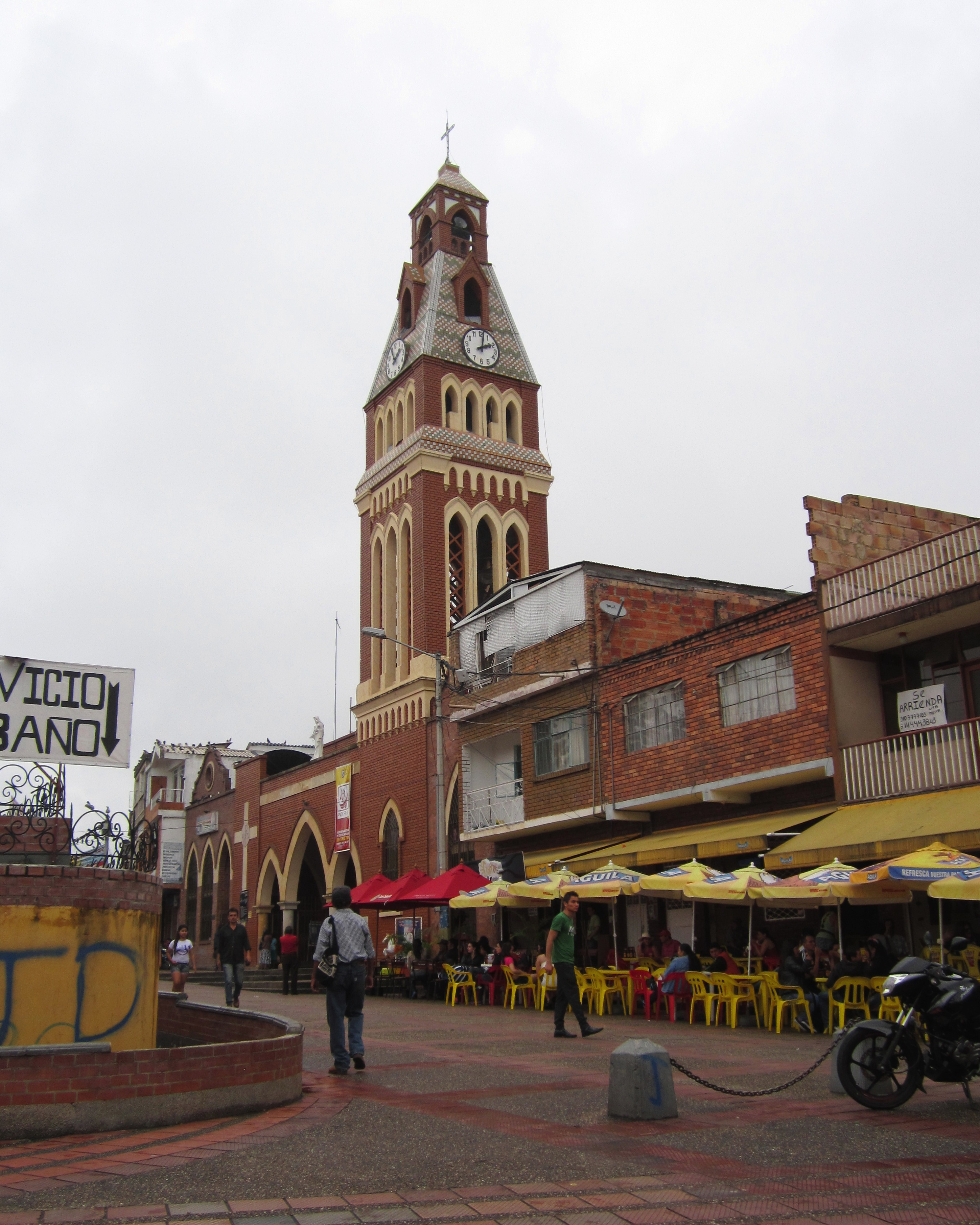 Torre del pueblo Mesitas del Colegio en Cundinamrca.